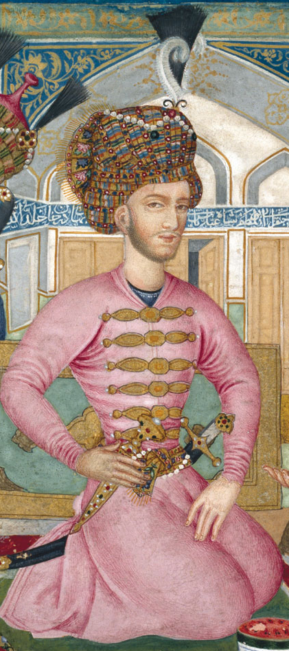 شاه عباس دوم، نقاشی آبرنگ، 1663 میلادی